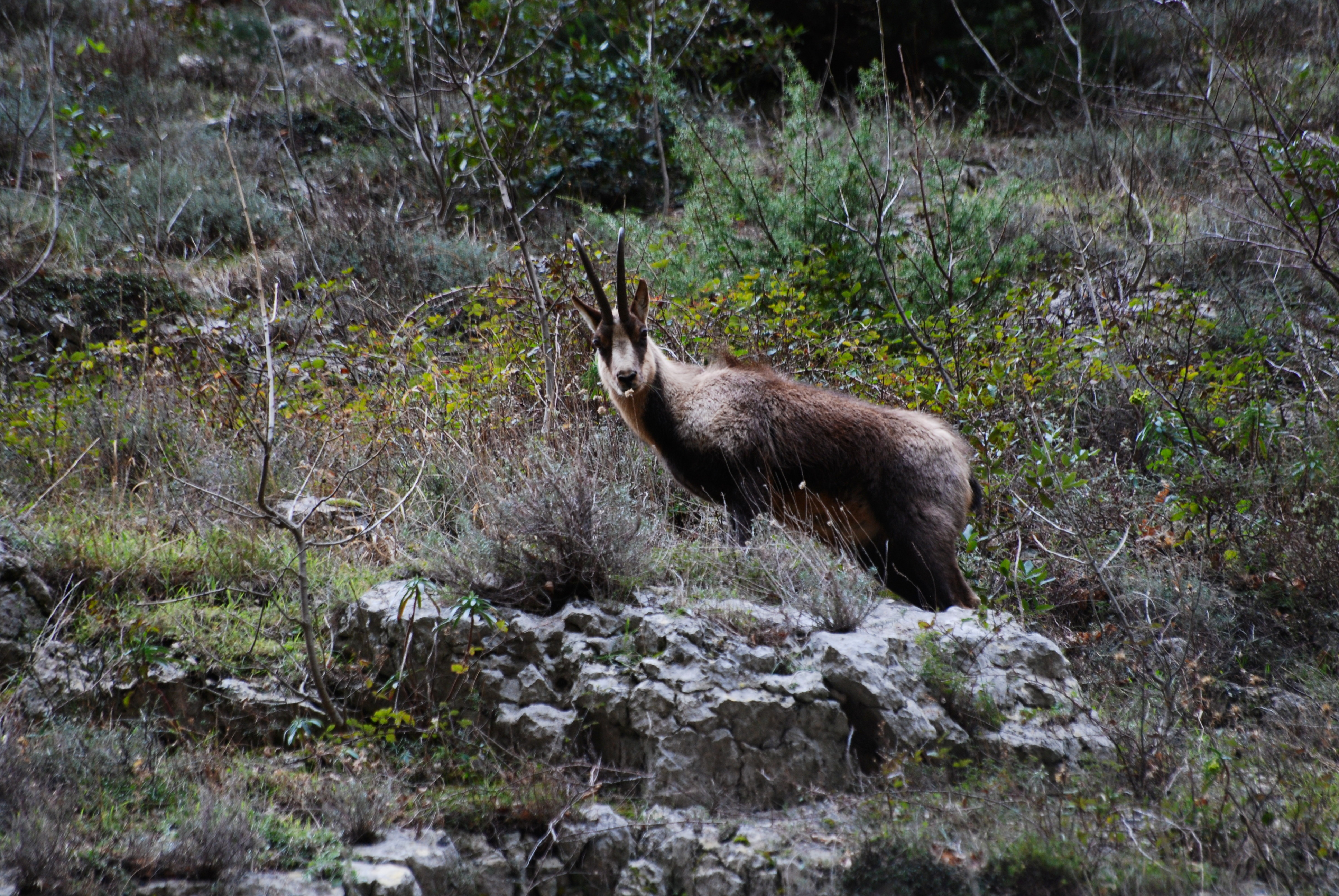 Camoscio appenninico nel Parco nazionale della Majella (Q1085735)